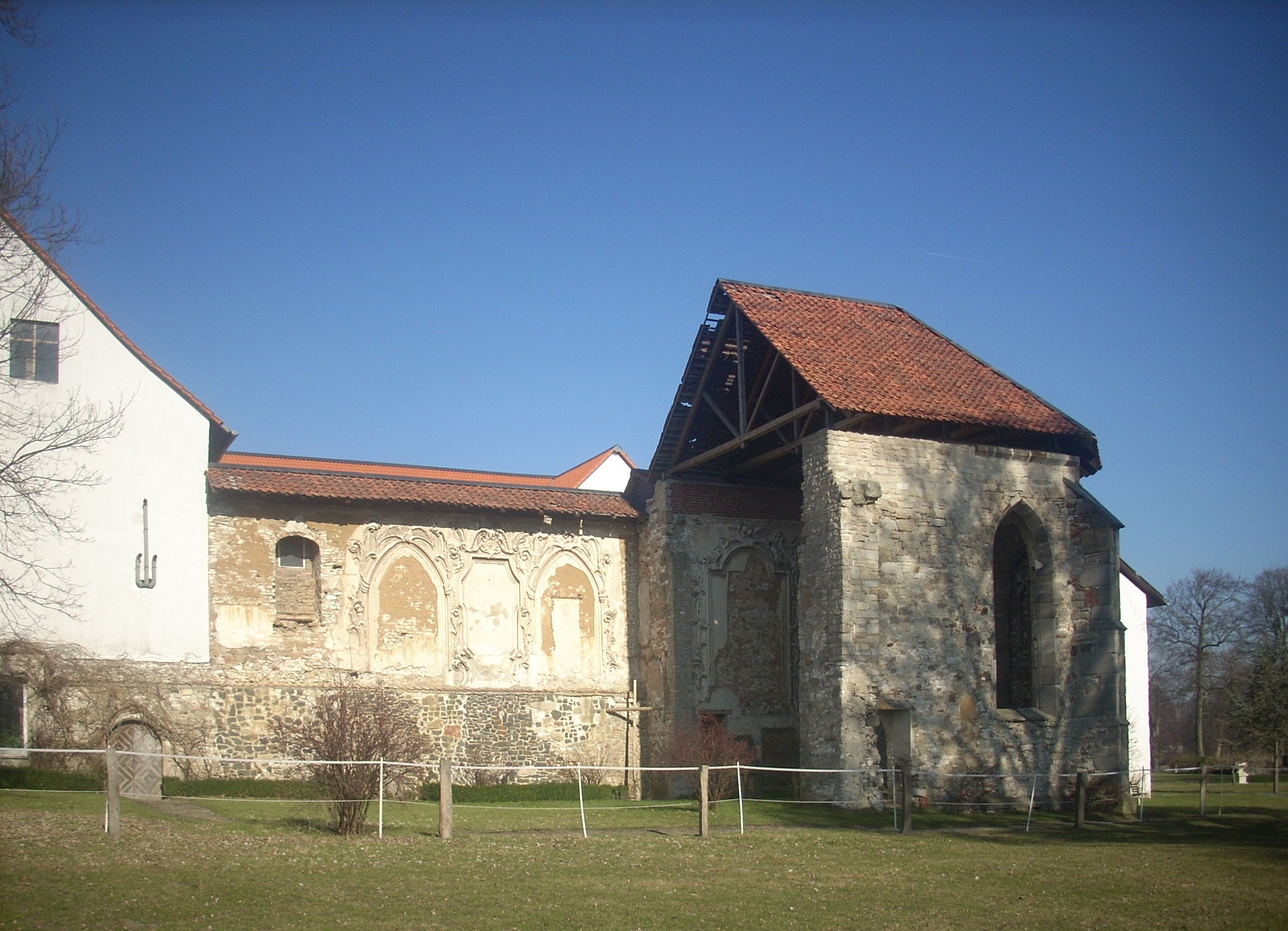 Dorstadt, Ruine der Klosterkirche von Süden